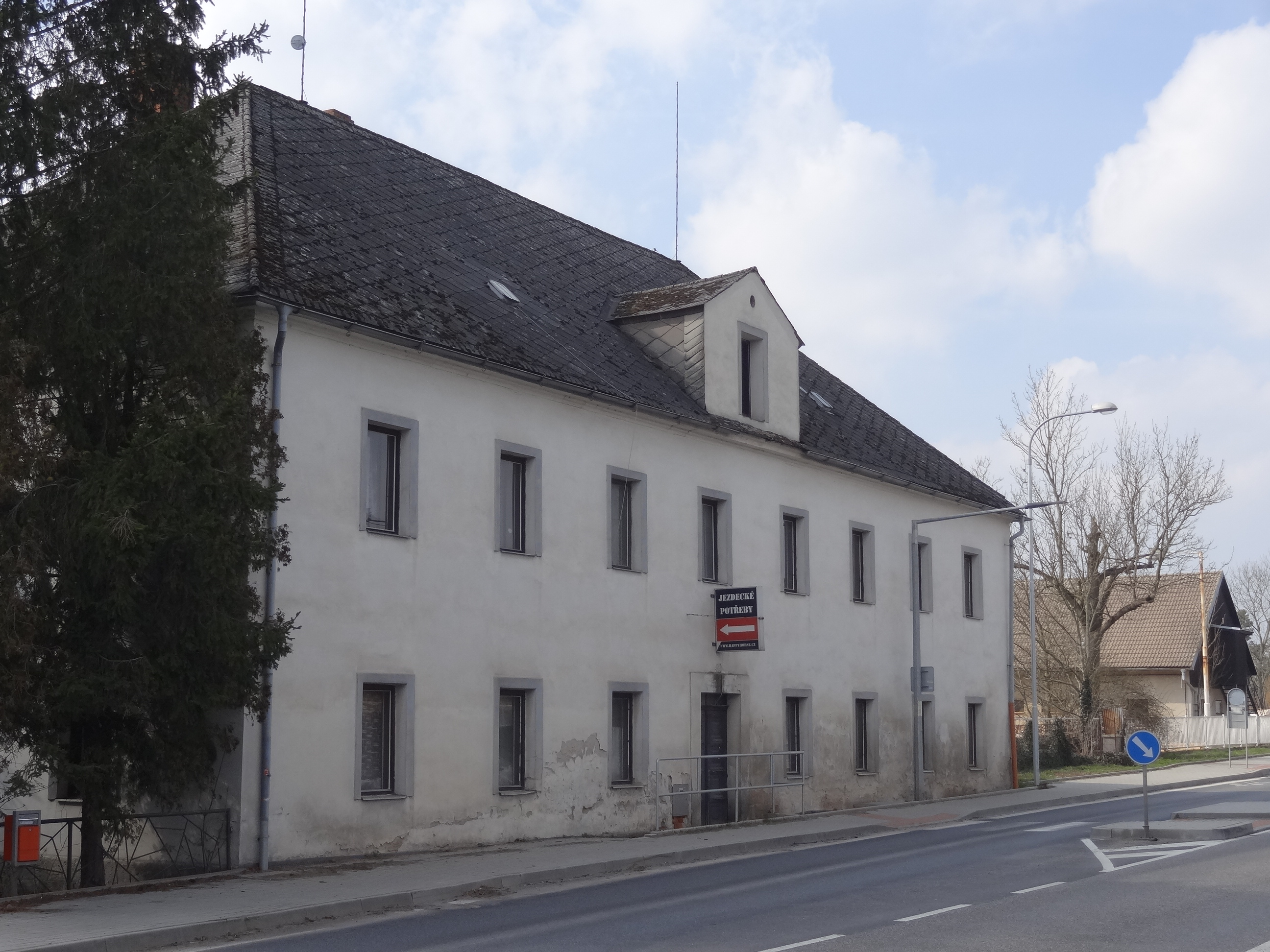 Hnanice - čp. 3